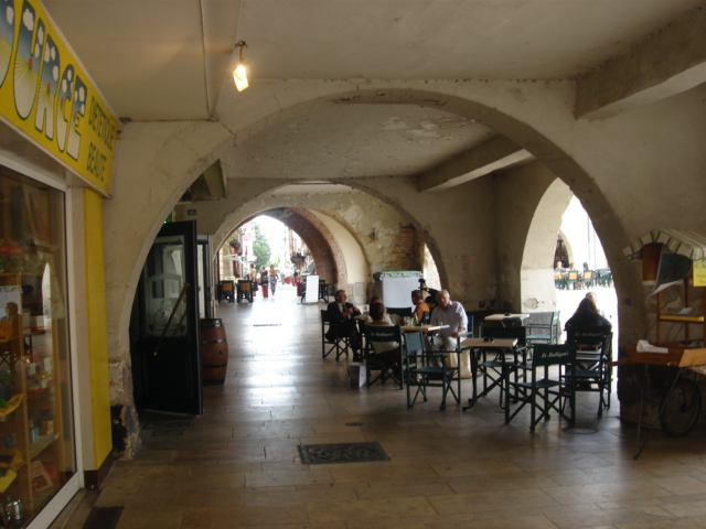 Couverts à arcades de Villeneuve-sur-Lot, café